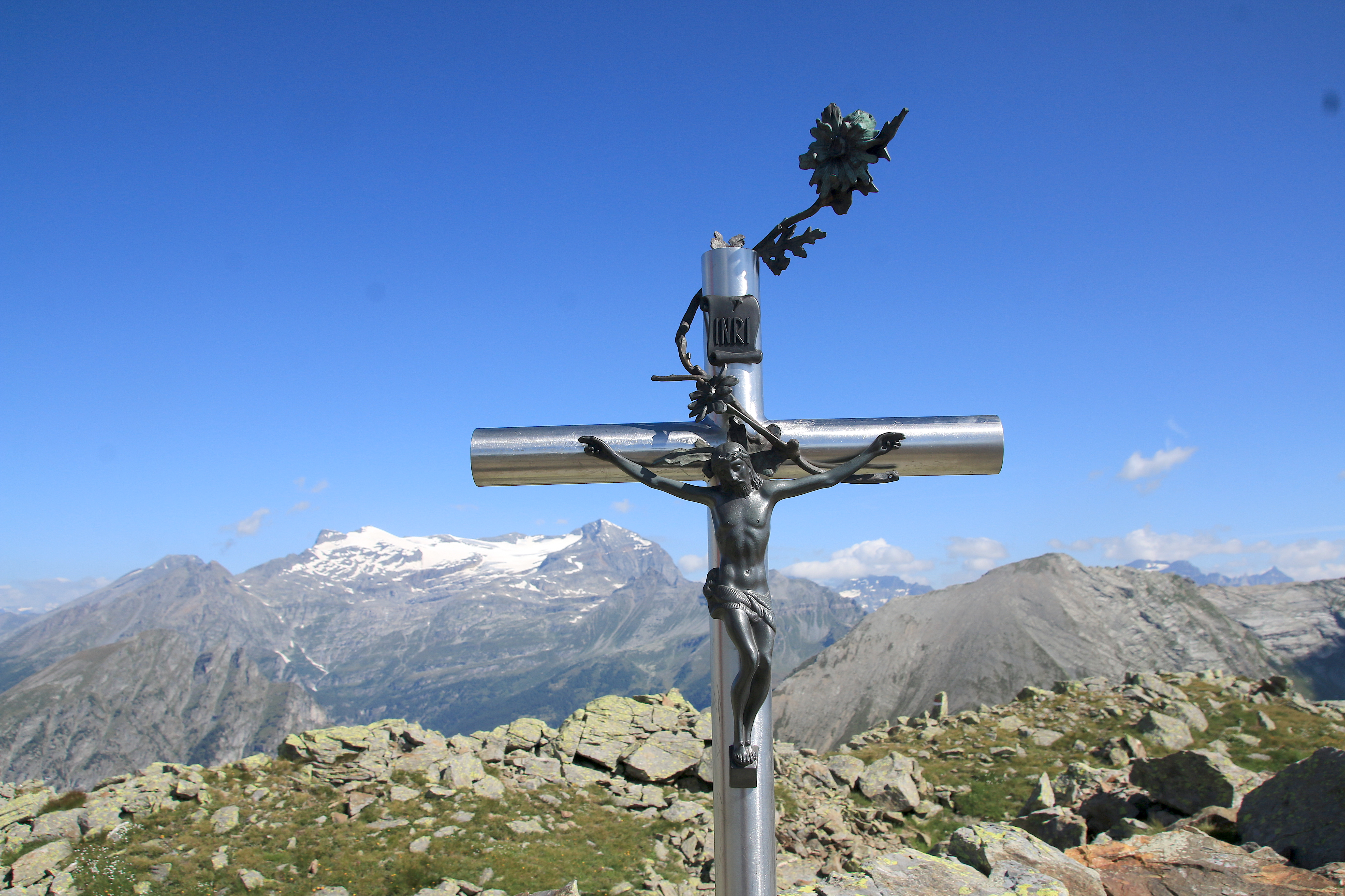 Gipfelkreuz auf dem Cima Verosso